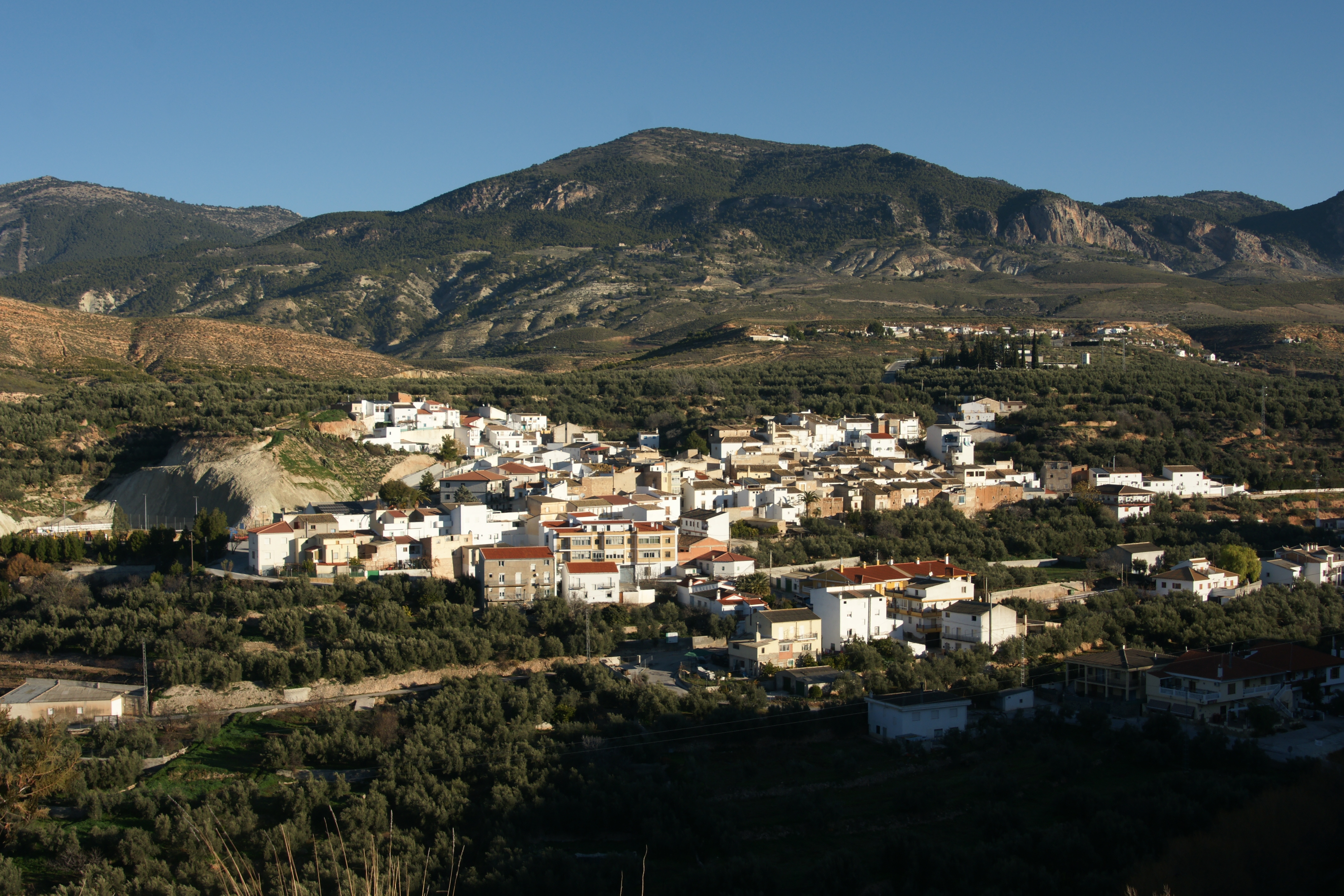 Hinojares (Jaén, España).